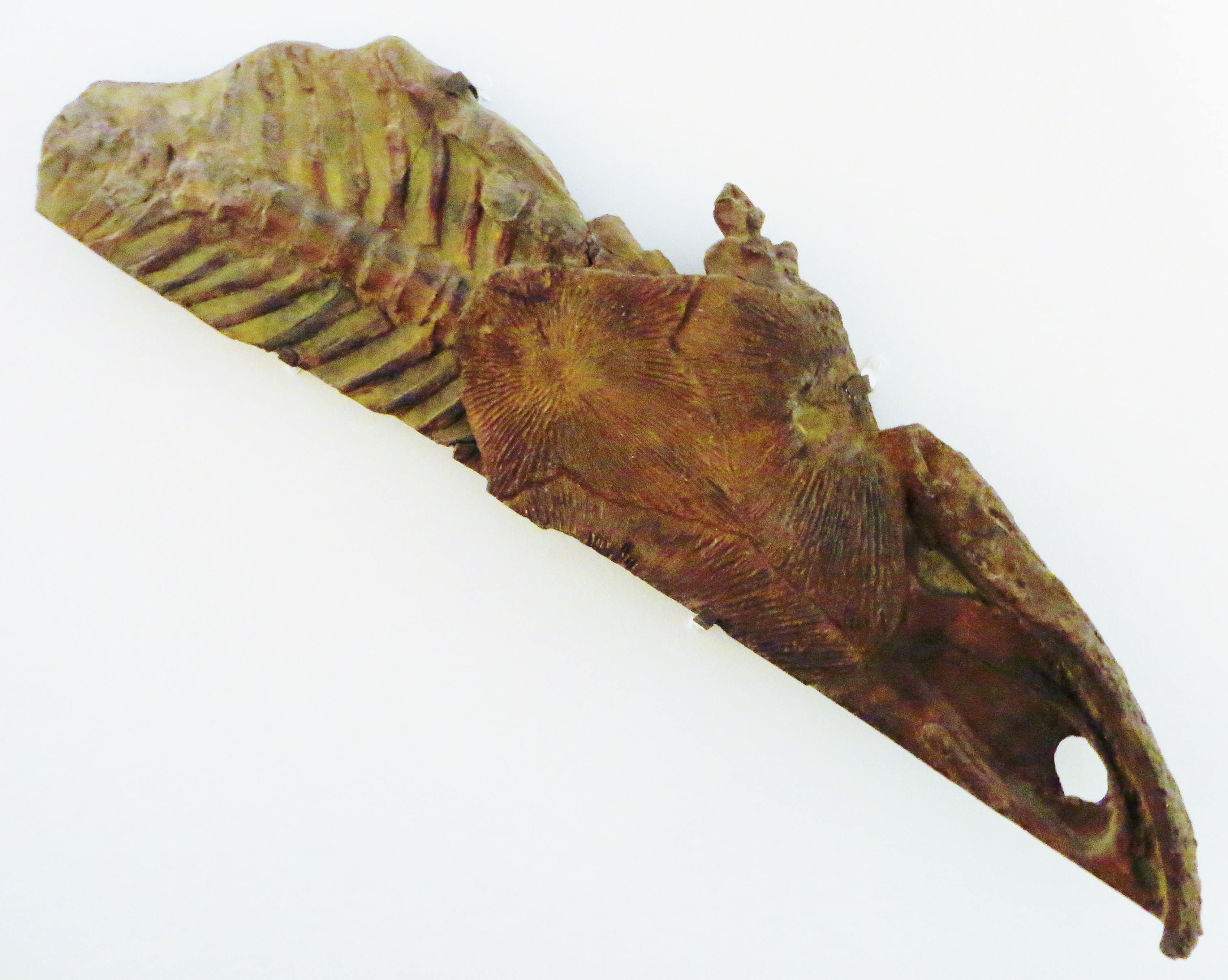 Fossil of Metoposaurus, an extinct amphibian- Took the picture at Museum of Paleontology, Tuebingen